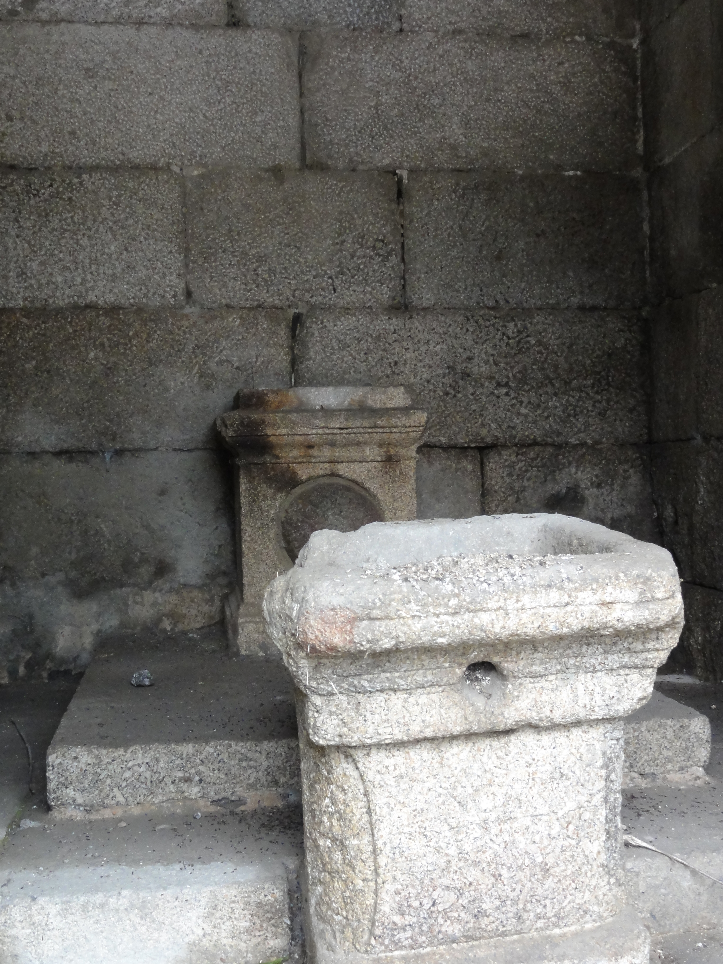 Ara votiva romana en el interior del templo de Trajano en el Puente de Alcántara (Cáceres, España)